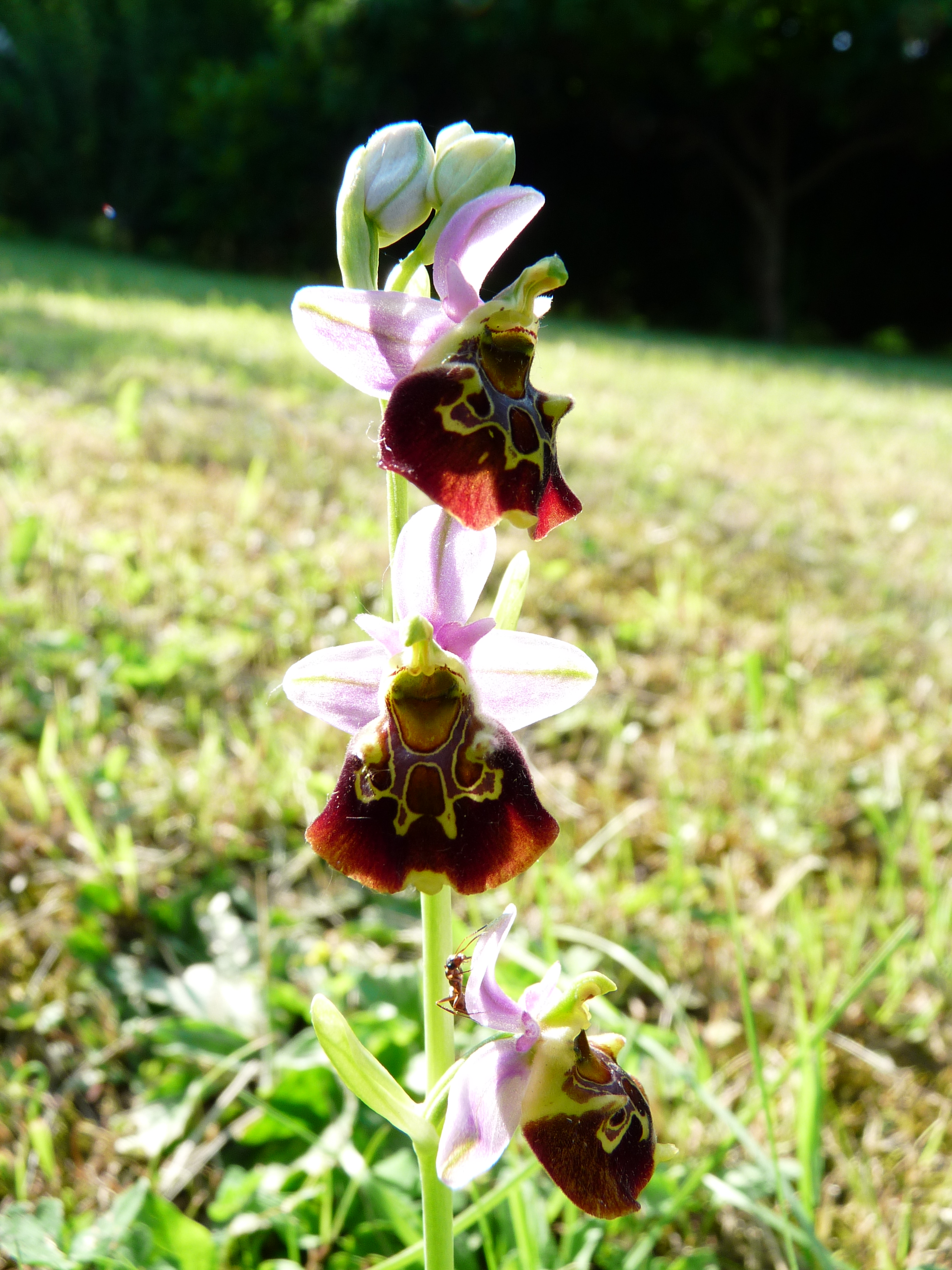 Ophrys fuciflora à Charmes-la-Côte (54113, Meurthe-et-Moselle, Lorraine, France).